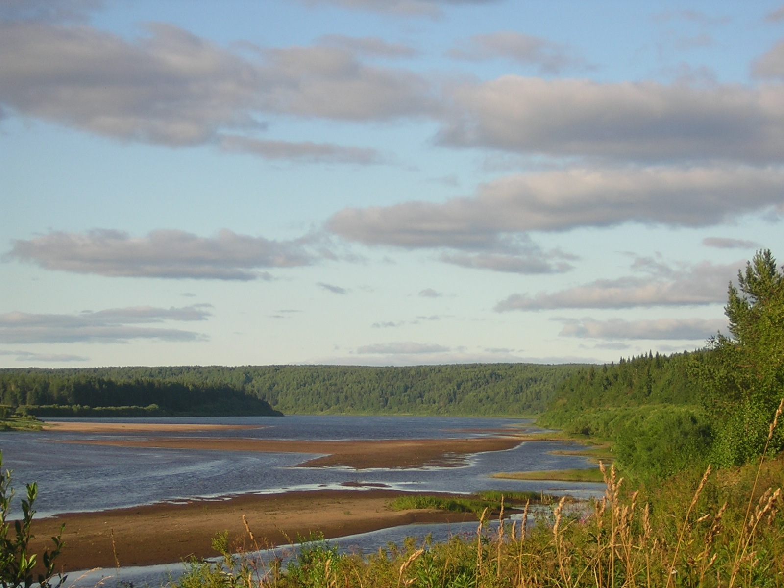 Vymjoki. Vym-jokea Serjogovon kylän lähellä.